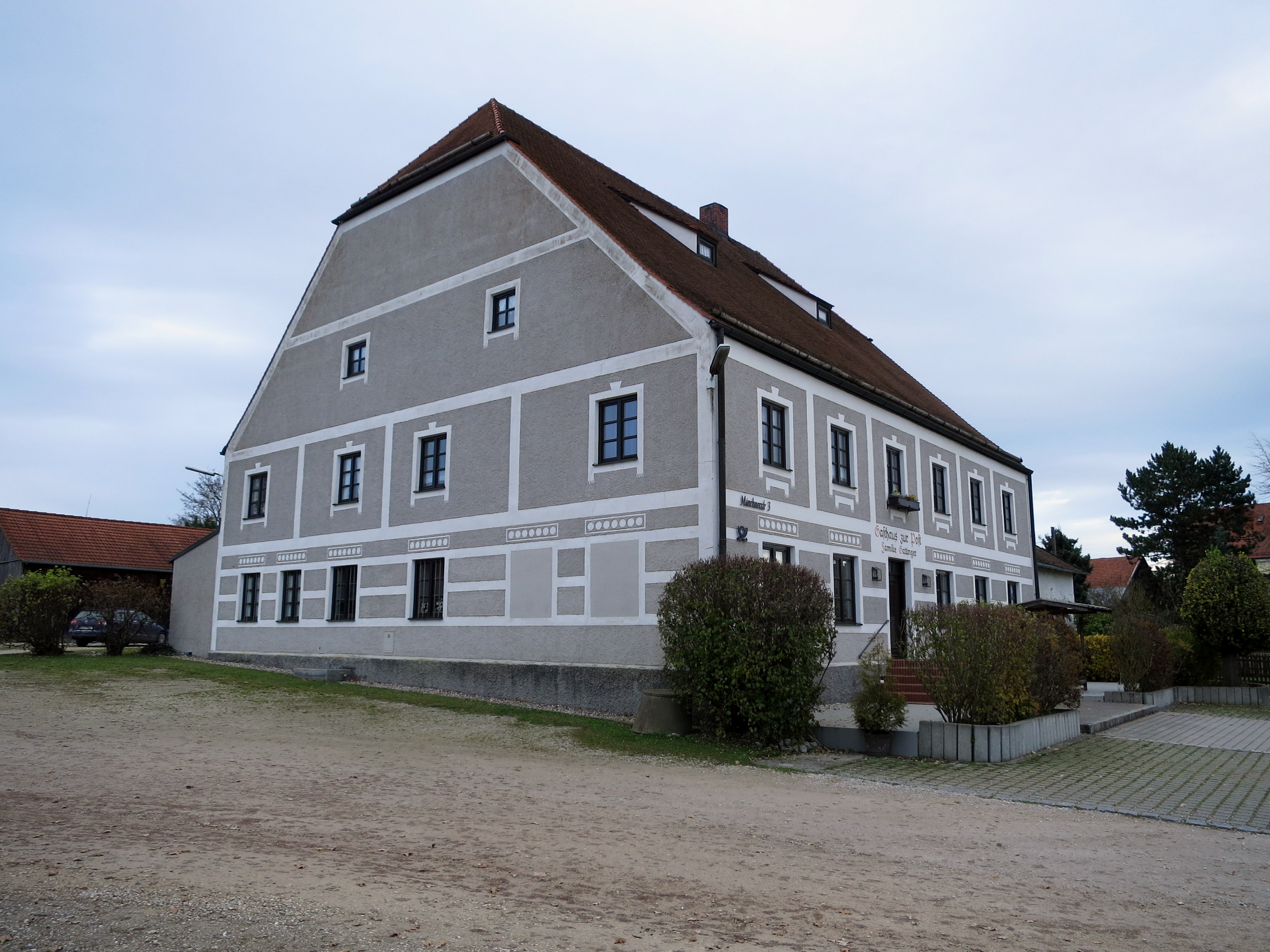 Barockes Gasthaus zur Post